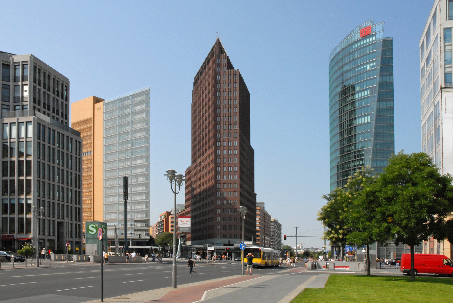 La Potsdamerplatz, avec ses trois gratte-ciel, est une des grandes réussites architecturales du nouveau Berlin. Au centre, l'extrémité nord de l'aire Daimler Benz en briques vernissées rouge brun de l'architecte Hans Kollhoff. A droite, l'entrée du Sony Center de l'architecte Helmut Jahn. A gauche, l'immeuble de bureaux des architectes Renzo Piano et Christoph Kohlbecker.